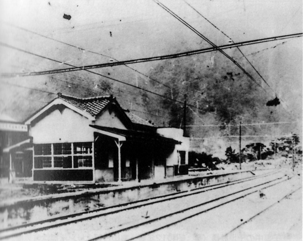 開業当時の富山県営鉄道粟巣野駅